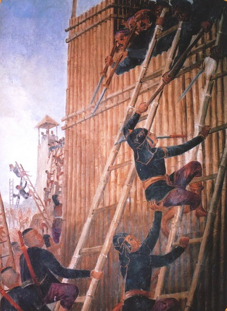 สมเด็จพระนเรศวรทรงพาทหารรักษาพระองค์ และเอาพระองค์ออกนำหน้าทรงคาบพระแสงดาบขึ้นปล้นค่ายพระเจ้าหงสาวดี แต่พวกพม่าต่อสู้และป้องกันไว้เข้าค่ายไม่ได้ เมื่อพ.ศ.๒๑๒๘ พระชันษา ๓๑ ปี